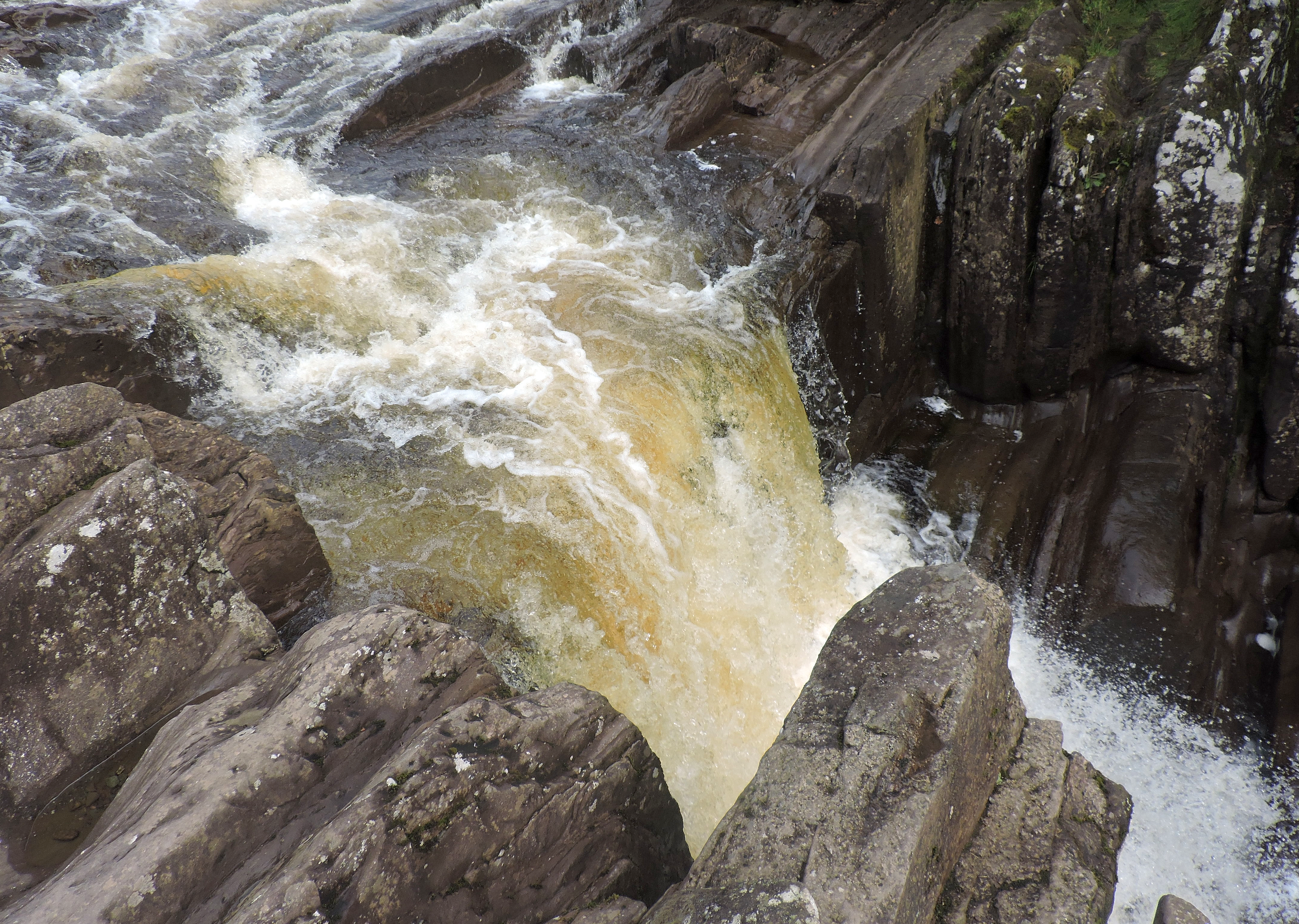 Bracklinn Falls: il salto più alto